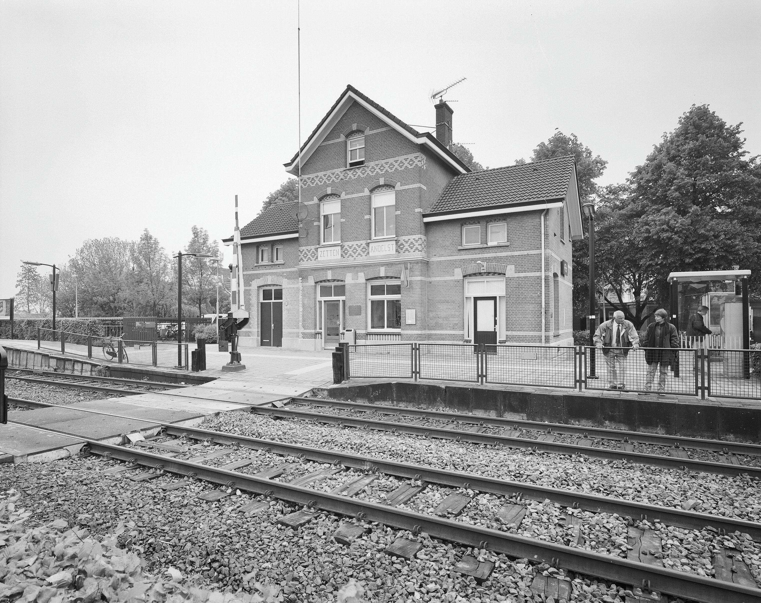 Station Zetten-Andelst: Overzicht achtergevel aan de spoorzijde en linker zijgevel met spoor op de voorgrond (opmerking: Gefotografeerd voor Monumenten In Nederland Gelderland)